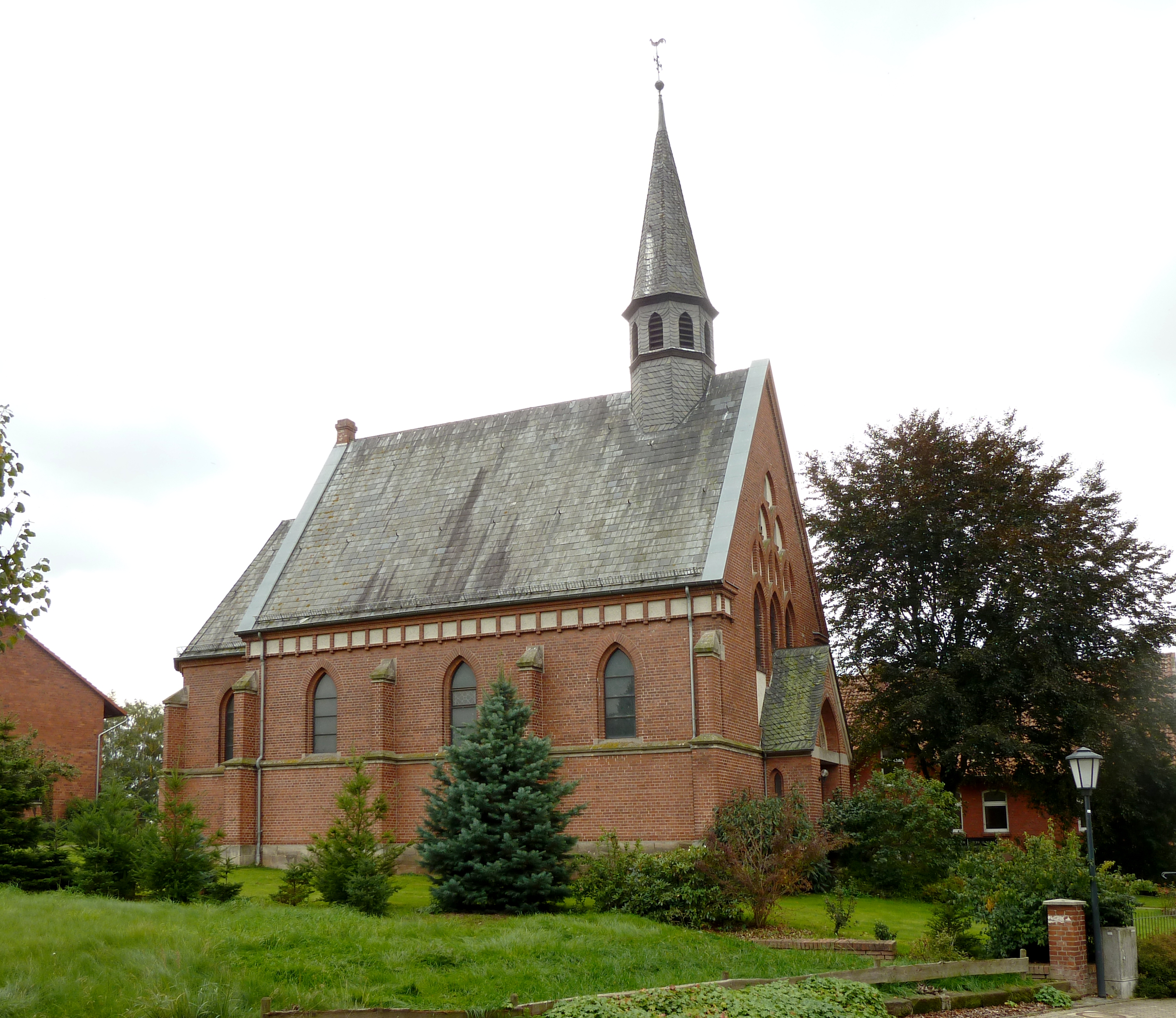 Katholische Kapelle St. Georg in Esplingerode, Stadt Duderstadt, Niedersachsen. Erbaut 1913 nach Plänen von Franz Huch in neugotischem Stil